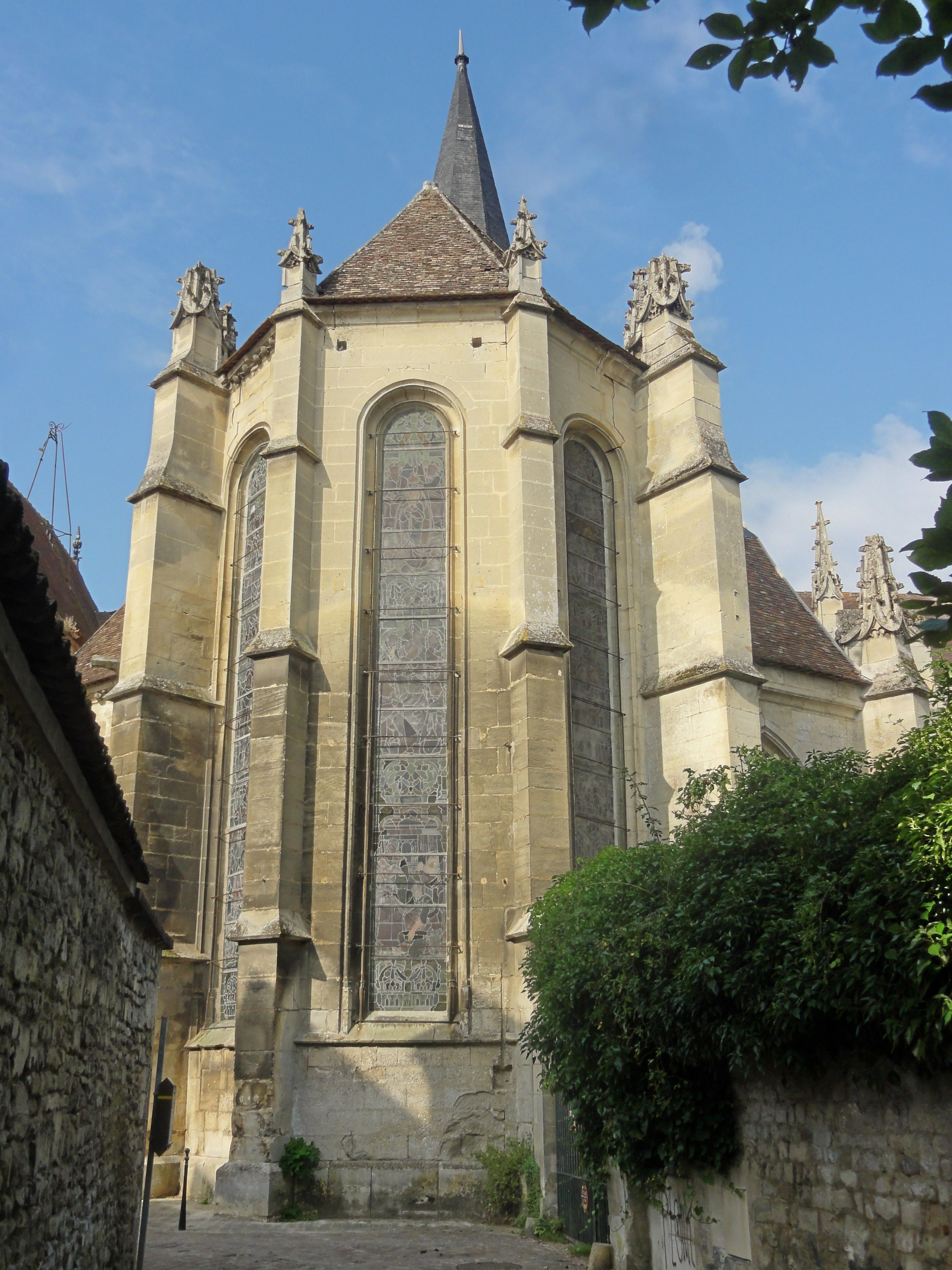 Chevet.